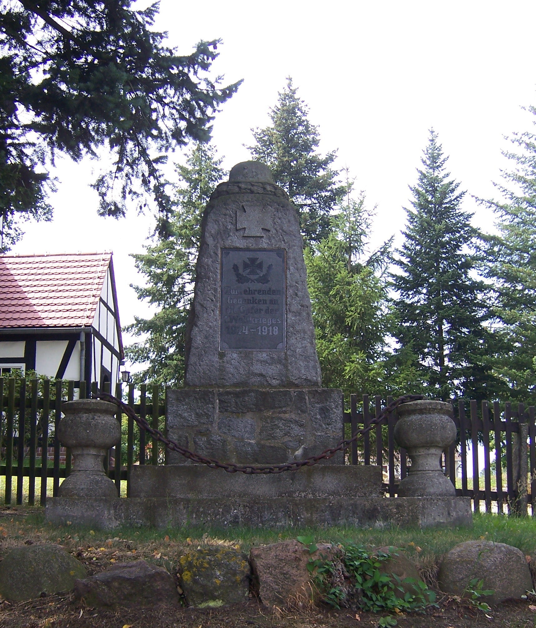 Denkmal in Spreewitz (Oberlausitz, Sachsen) Inschrift: Zum ehrenden Gedenken an die Opfer des 1. Weltkrieges 1914–1918